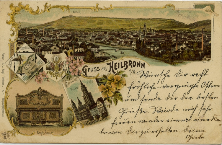 Gesamtansicht mit Neckar und Wartberg, Kilianskirche, Nagels Piano; Emblem der Pianofortefabrik Nagel für die Heilbronner Gewerbe-, Industrie- und Kunstausstellung 1897 - Ansichtskarte im Stadtarchiv Heilbronn, Signatur F003-M_0441-7071